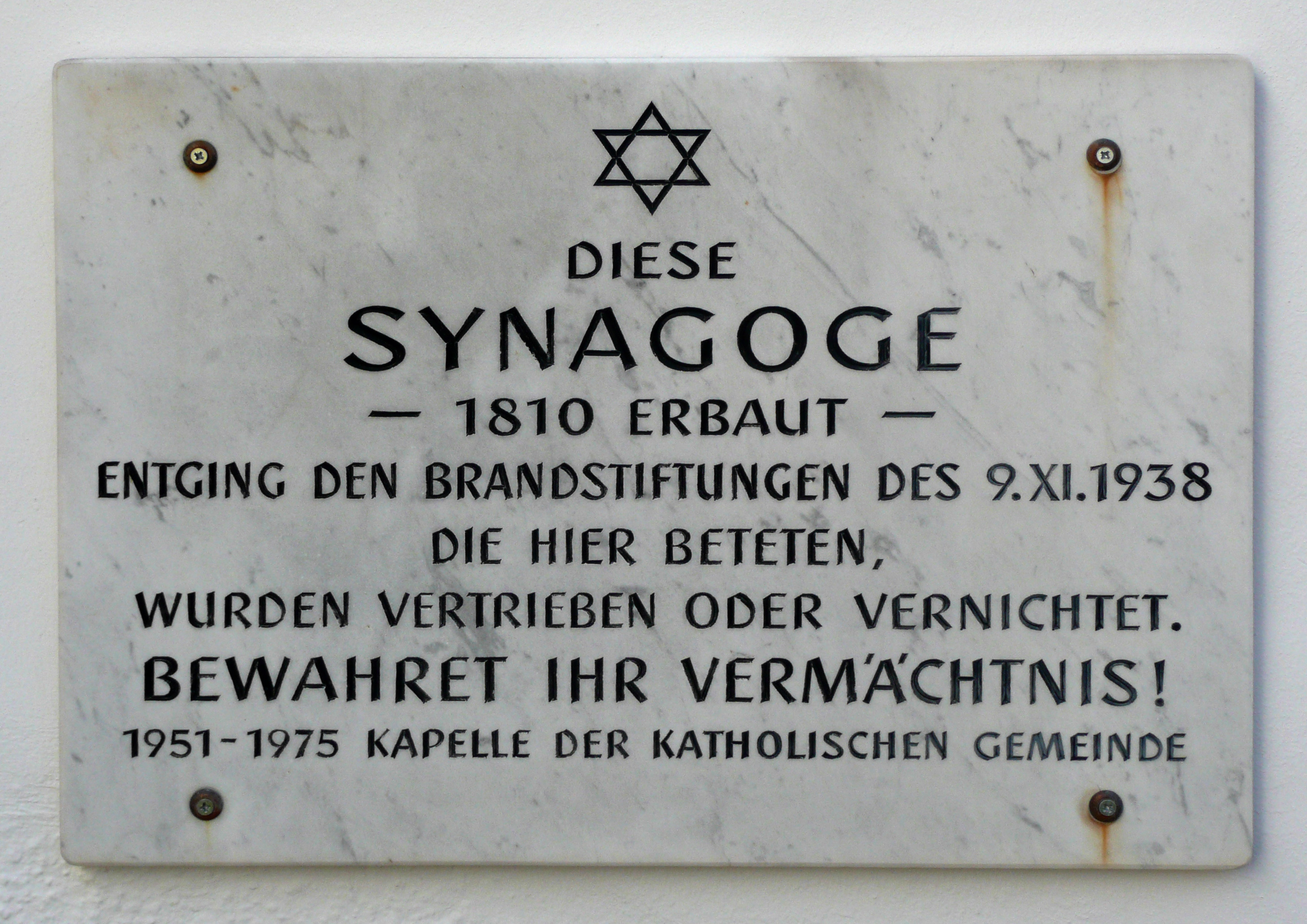 Gedenktafel an der ehemaligen Synagoge in Dransfeld, Südniedersachsen. Inschrift: Diese Synagoge – 1810 erbaut – entging den Brandstiftungen des 9. XI. 1938 Die hier beteten, wurden vertrieben oder vernichtet. Bewahret ihr Vermächtnis! 1951–1975 Kapelle der katholischen Gemeinde This is a photograph of an architectural monument.It is on the list of cultural monuments of Niedersachsen